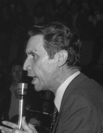 Toulouse (Haute-Garonne). 25 Avril 1974. Vue du meeting de Jean Royer à Toulouse.